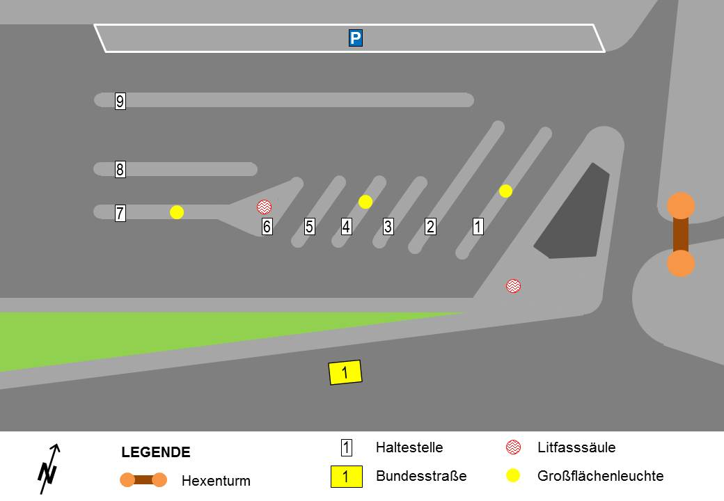 Lageplan des alten Jülicher Busbahnhofs am Walramplatz, Zustand um 1970